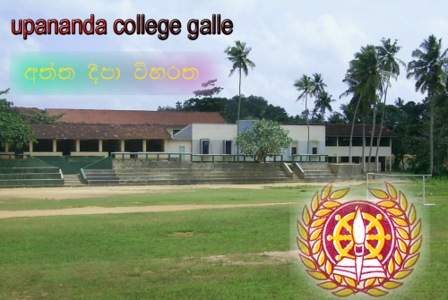 සිංහල: උපනන්ද විද්‍යාලය - ක්‍රීඩා පිටිය දෙසින්